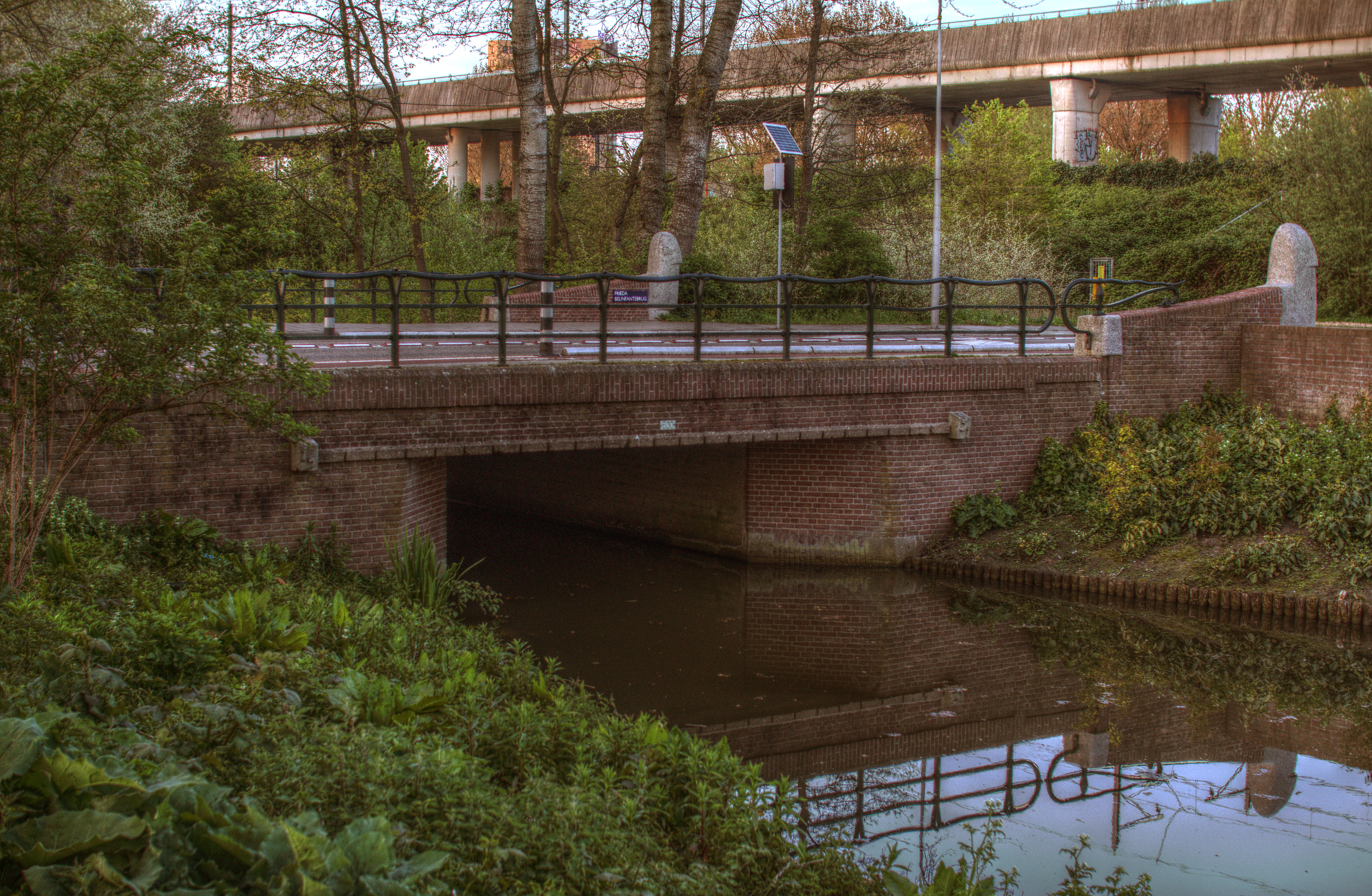 De Frieda Belinfantebrug in de Amsterdamse wijk Slotermeer